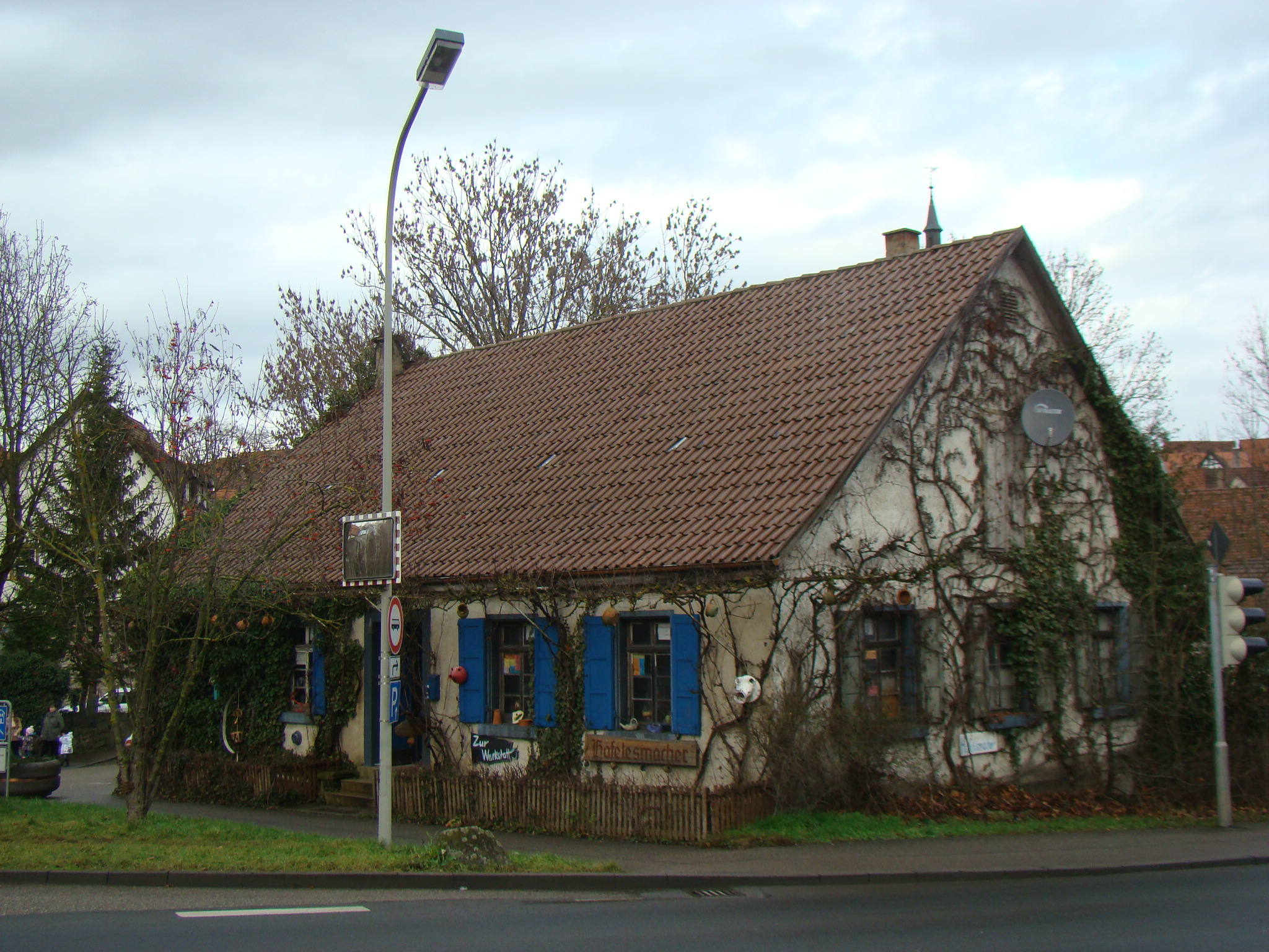 Neutorstraße 15 (Bad Wimpfen)